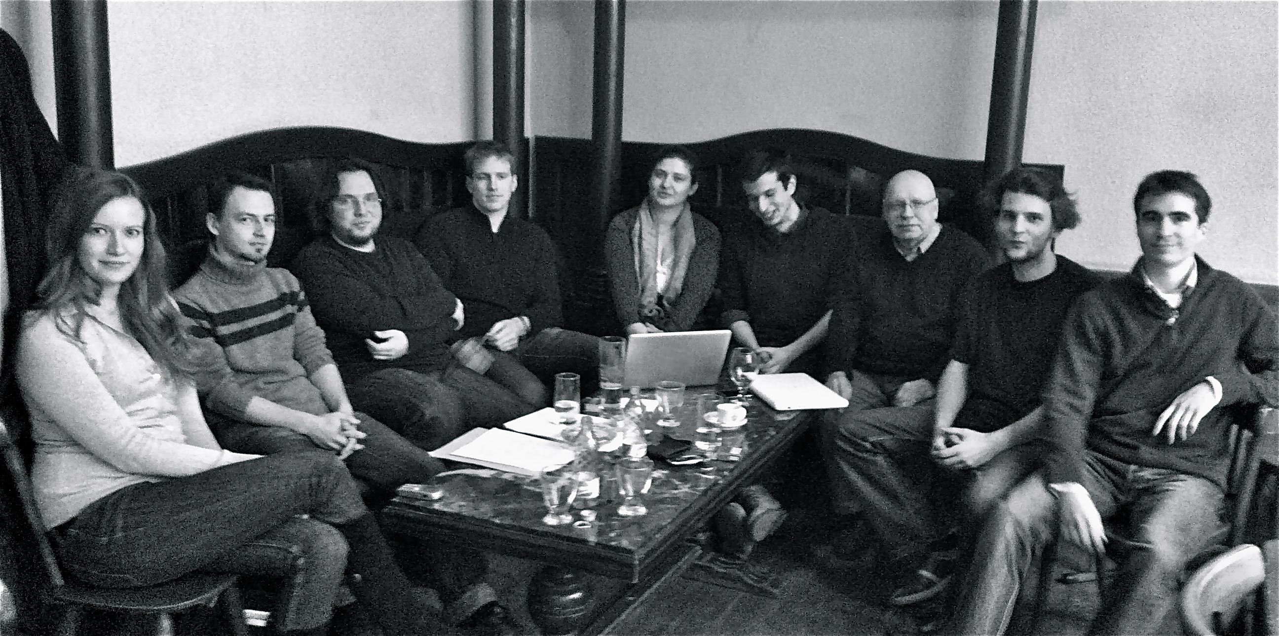 Az Apokrif szerkesztősége 2012-ben